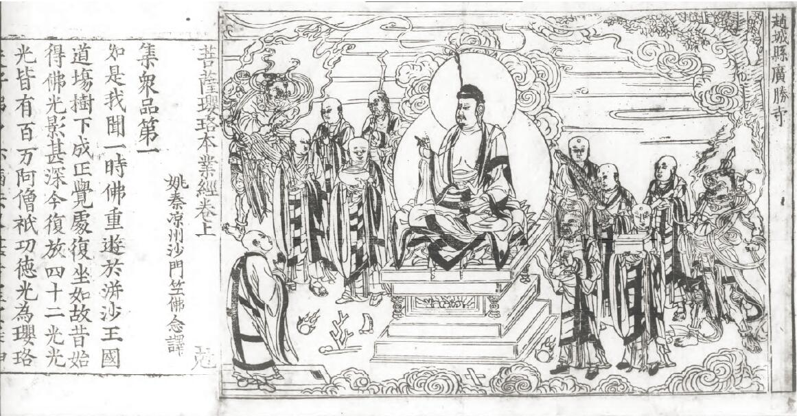 责任者(后秦)竺佛念譯版本项刻本大藏經本出版发行项廣勝寺金皇統九年[1149]山西趙城丛编项趙城金藏 版本书目史注每版23行行14字，上下單邊现有藏本附注存二卷：卷上、下國家圖書館 四部分类号子釋家